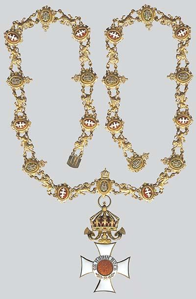 Орден Св. Александръ малко огърлие